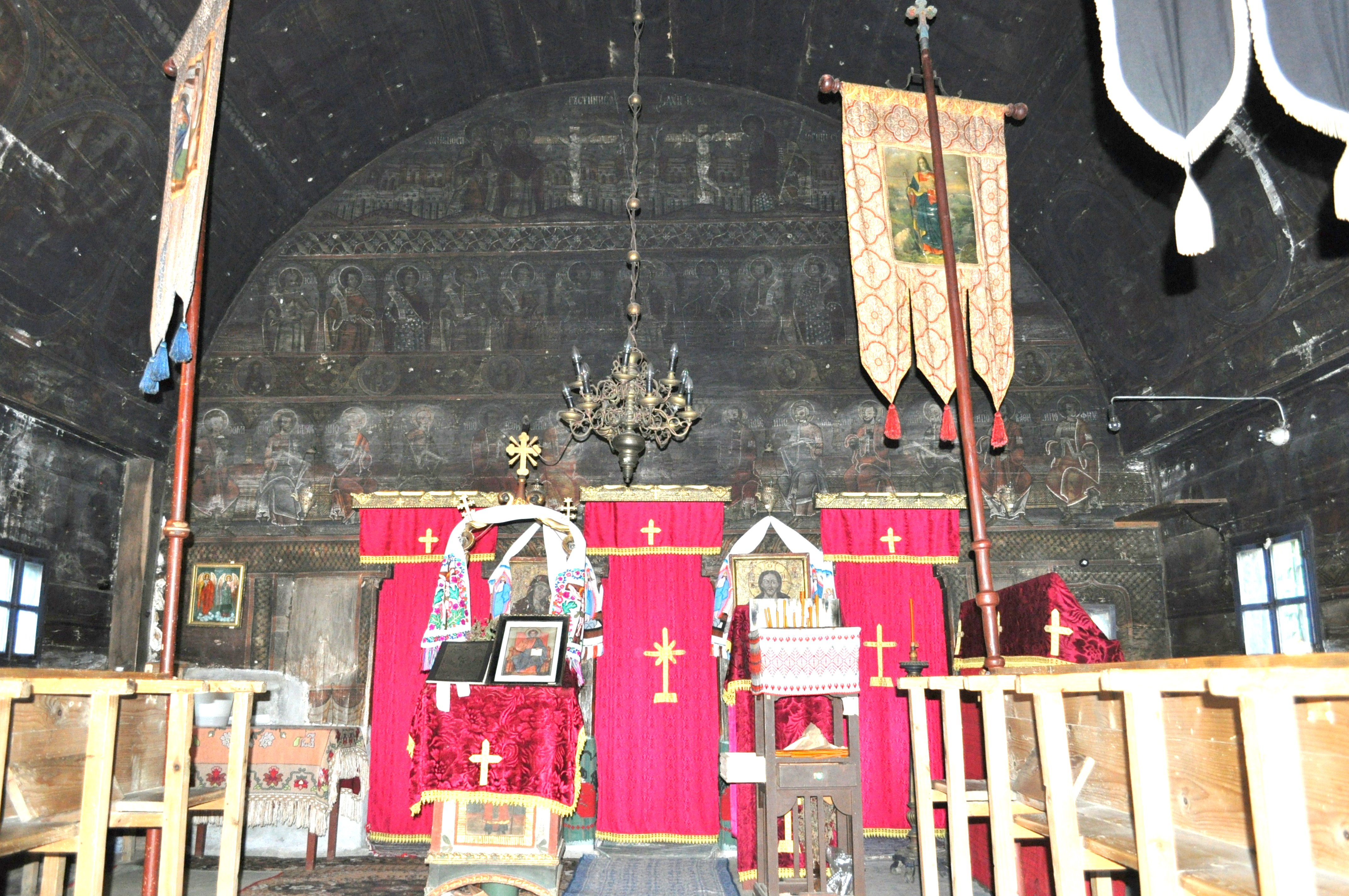 Biserica de lemn „Pogorârea Sf. Duh" din Sartăș, județul Alba